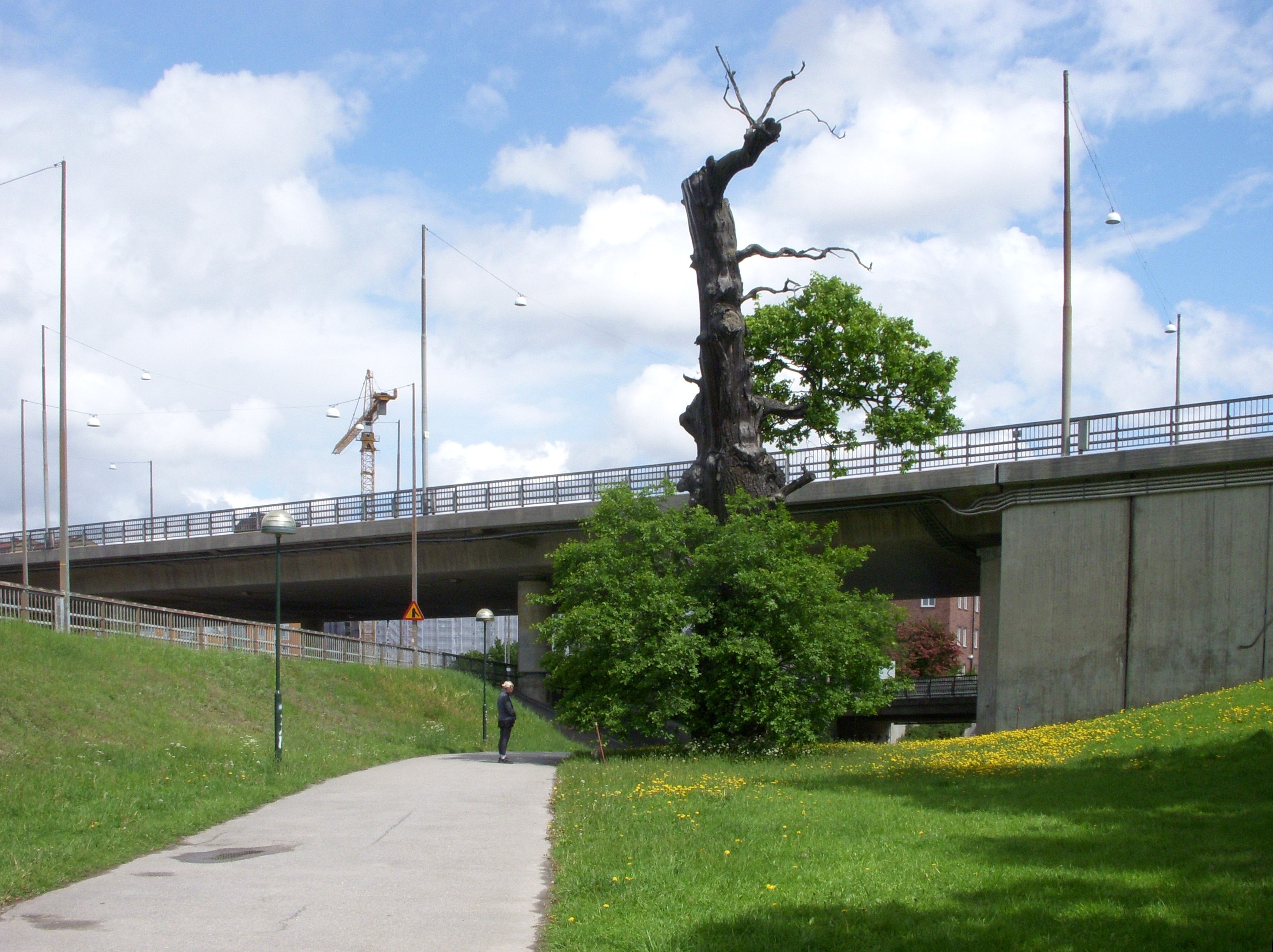 Birger jarls ek i Stockholm, Essingeleden i bakgrunden